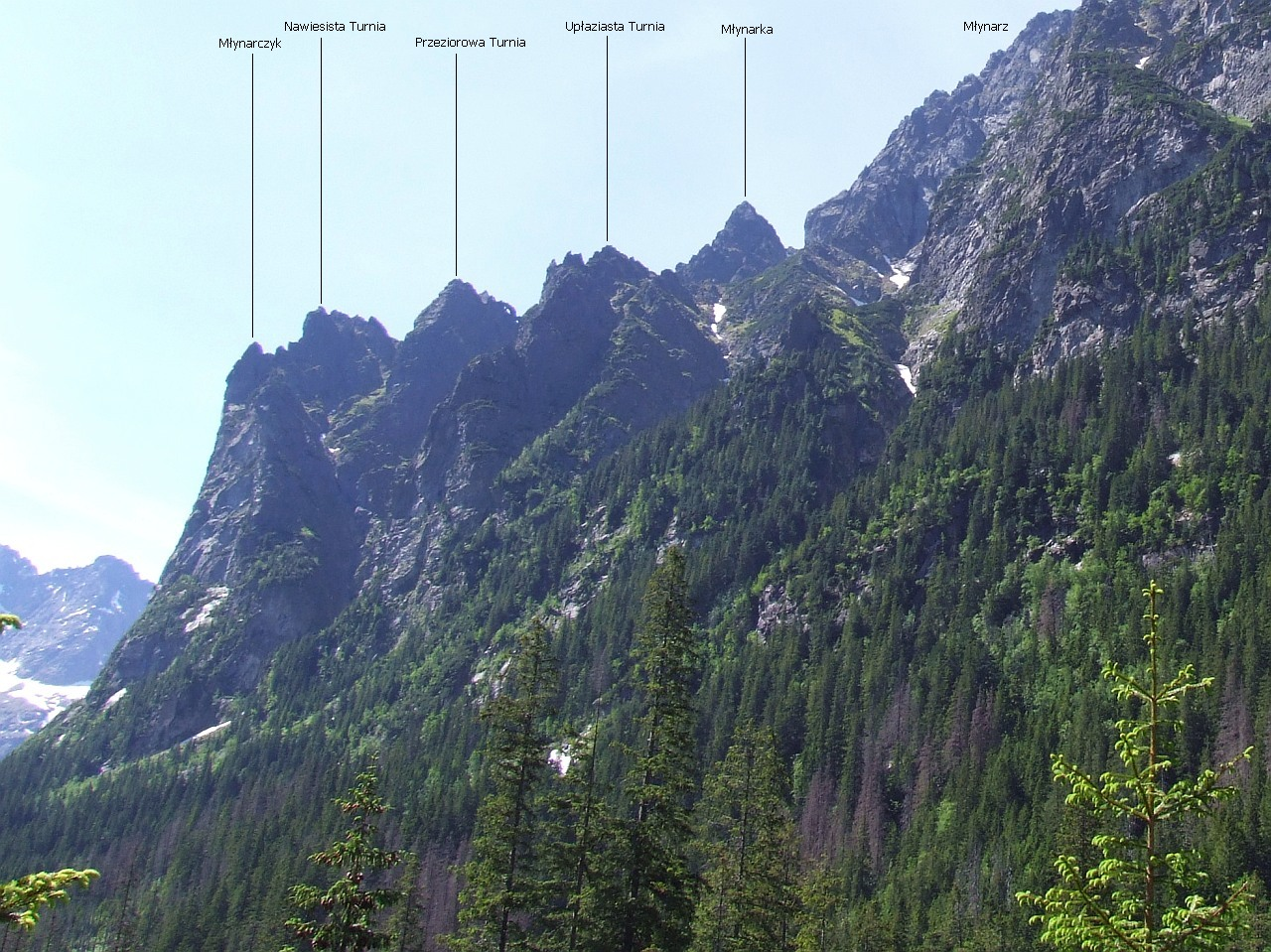 Młynarz, widok z okolic Polany pod Wysoką